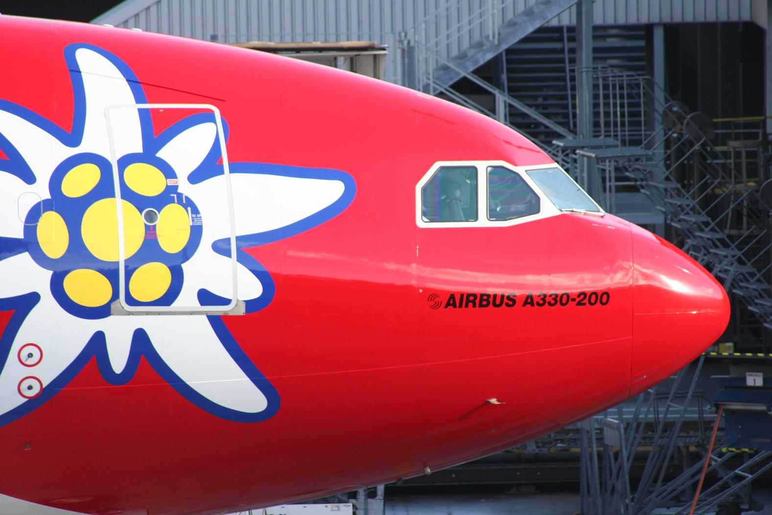 Airbus A330-200